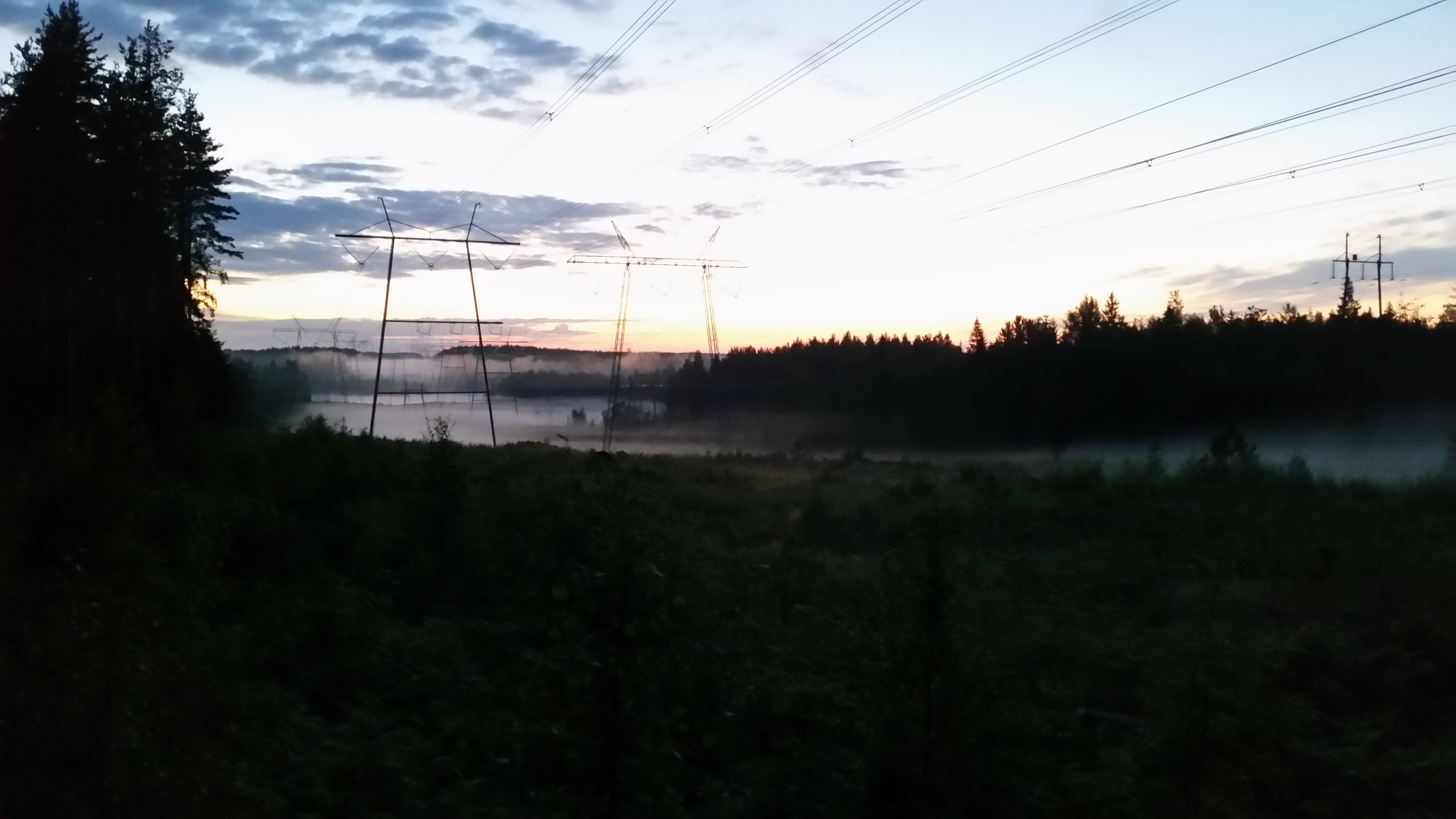 Rännikorpi voimalinja kesäkuu 2016.